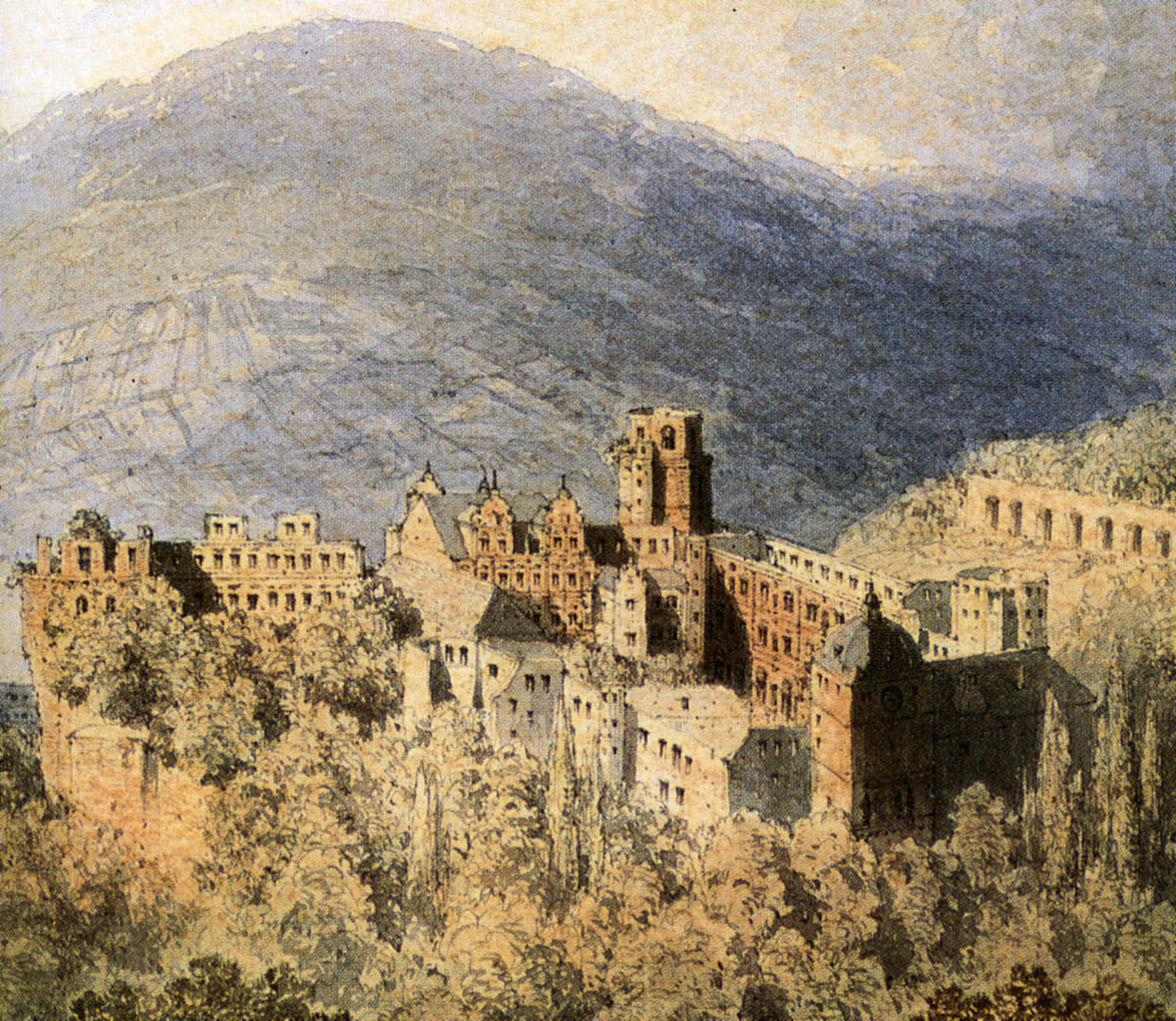 Castle of Heidelberg, Germany